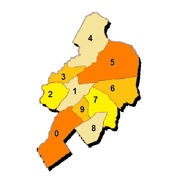 Gliederung der Stadt Delmenhorst in ihre zehn Stadtteile.